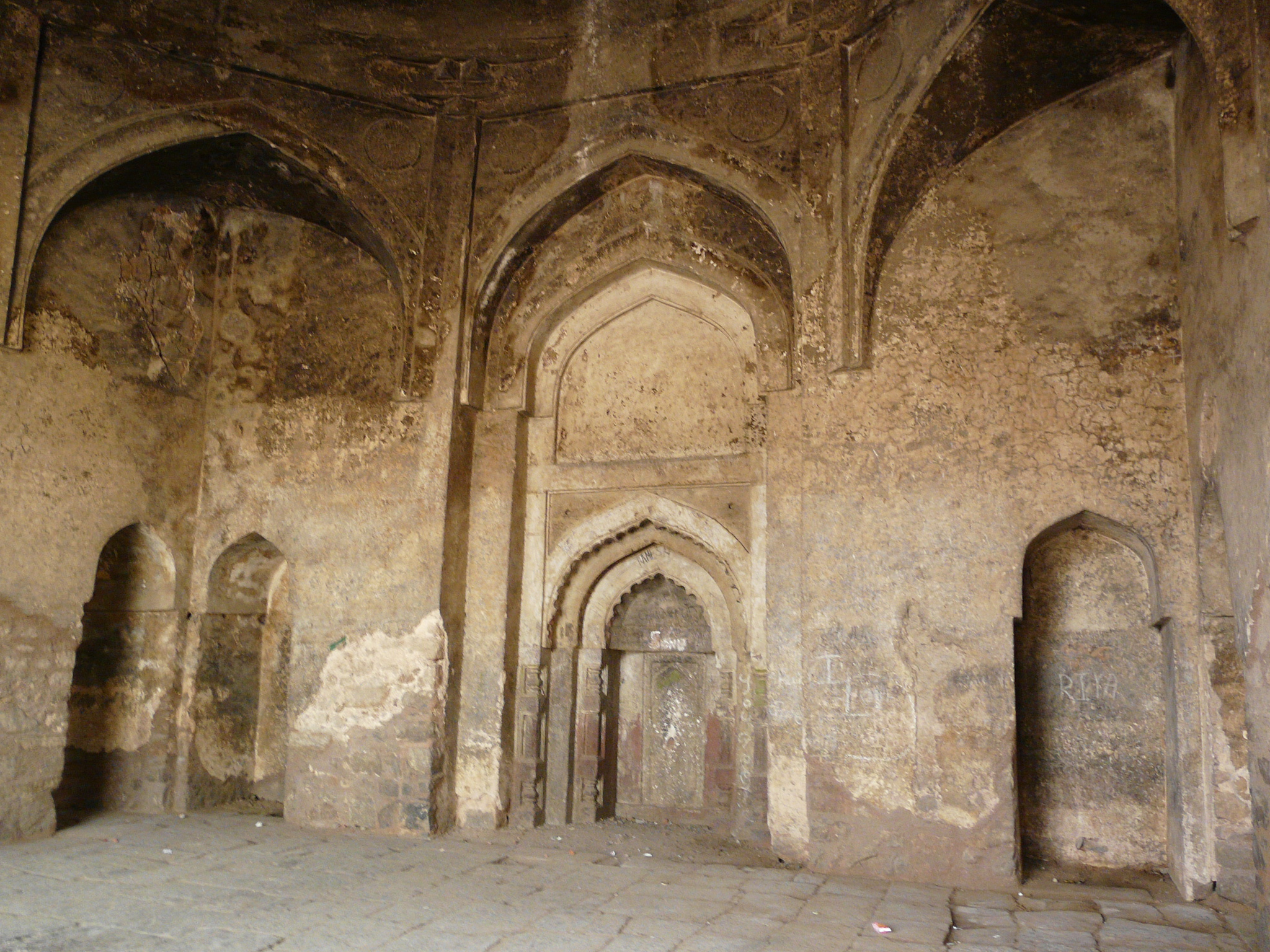 Begumpur Masjid Mihrabs under main west wall